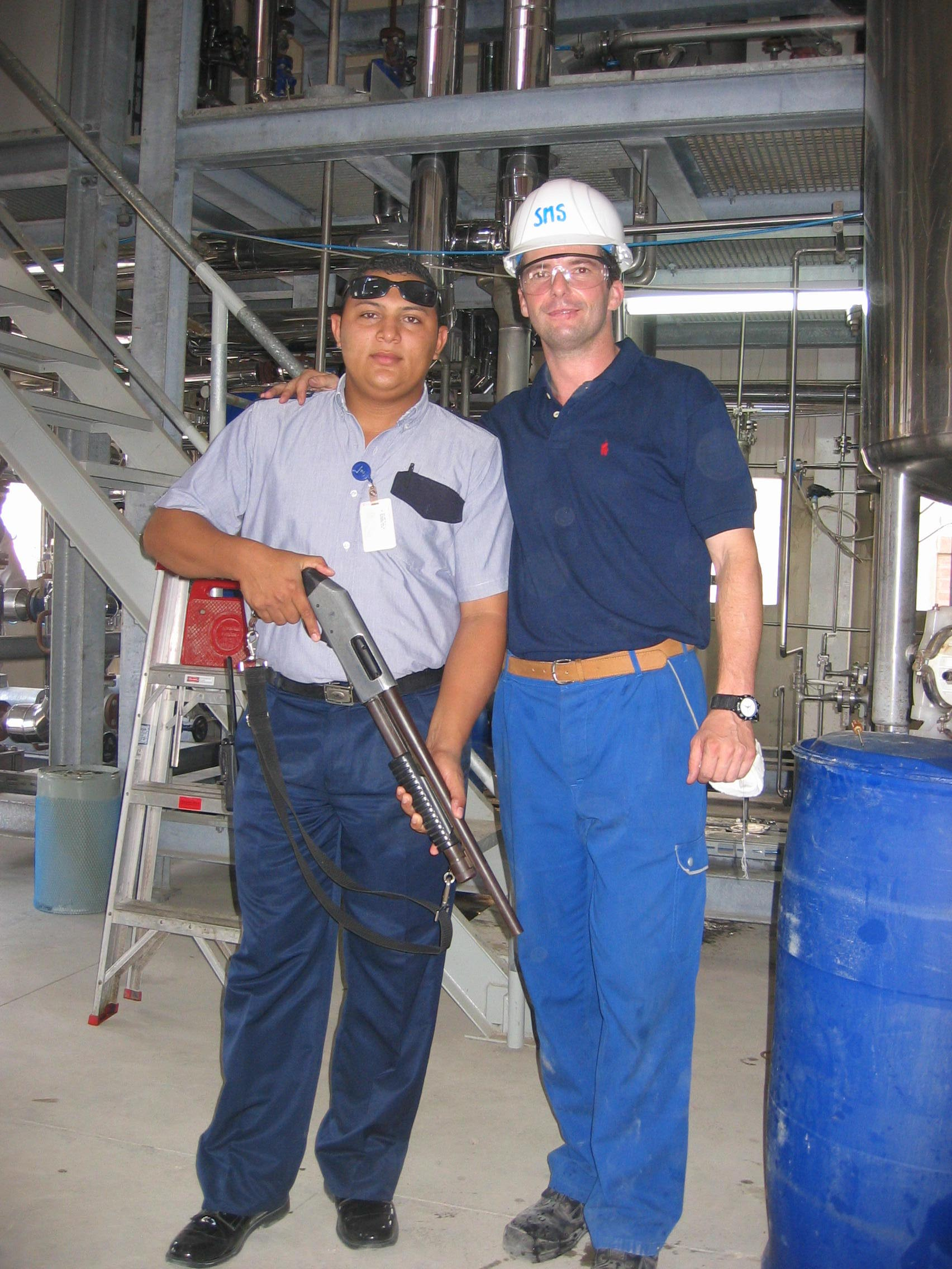 Stephan Thiemonds (rechts im Bild), während eines Arbeitseinsatzes in Barranquilla, Kolumbien, 2008.